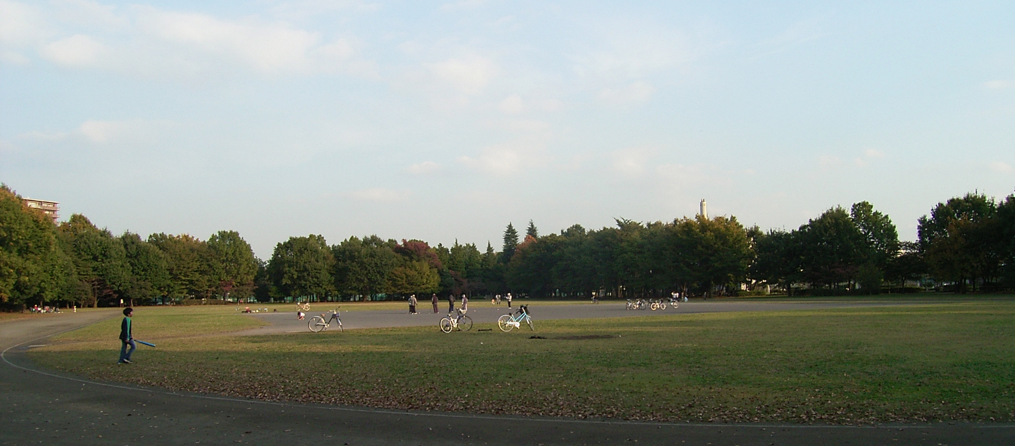 Higashiyamato-Southpark 都立東大和南公園 東京都東大和市桜が丘